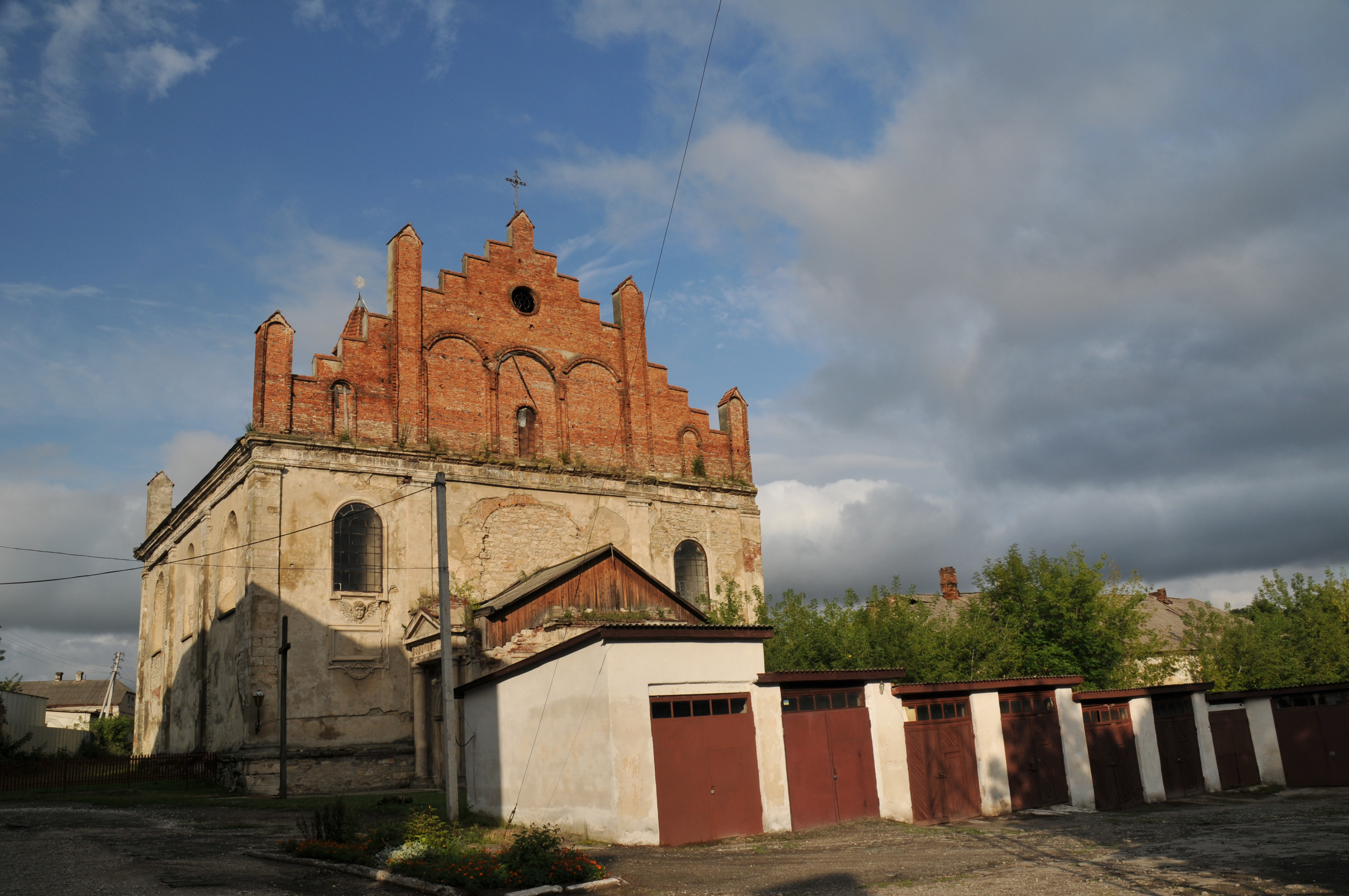 Гусятин, костел Бернардинського монастиря